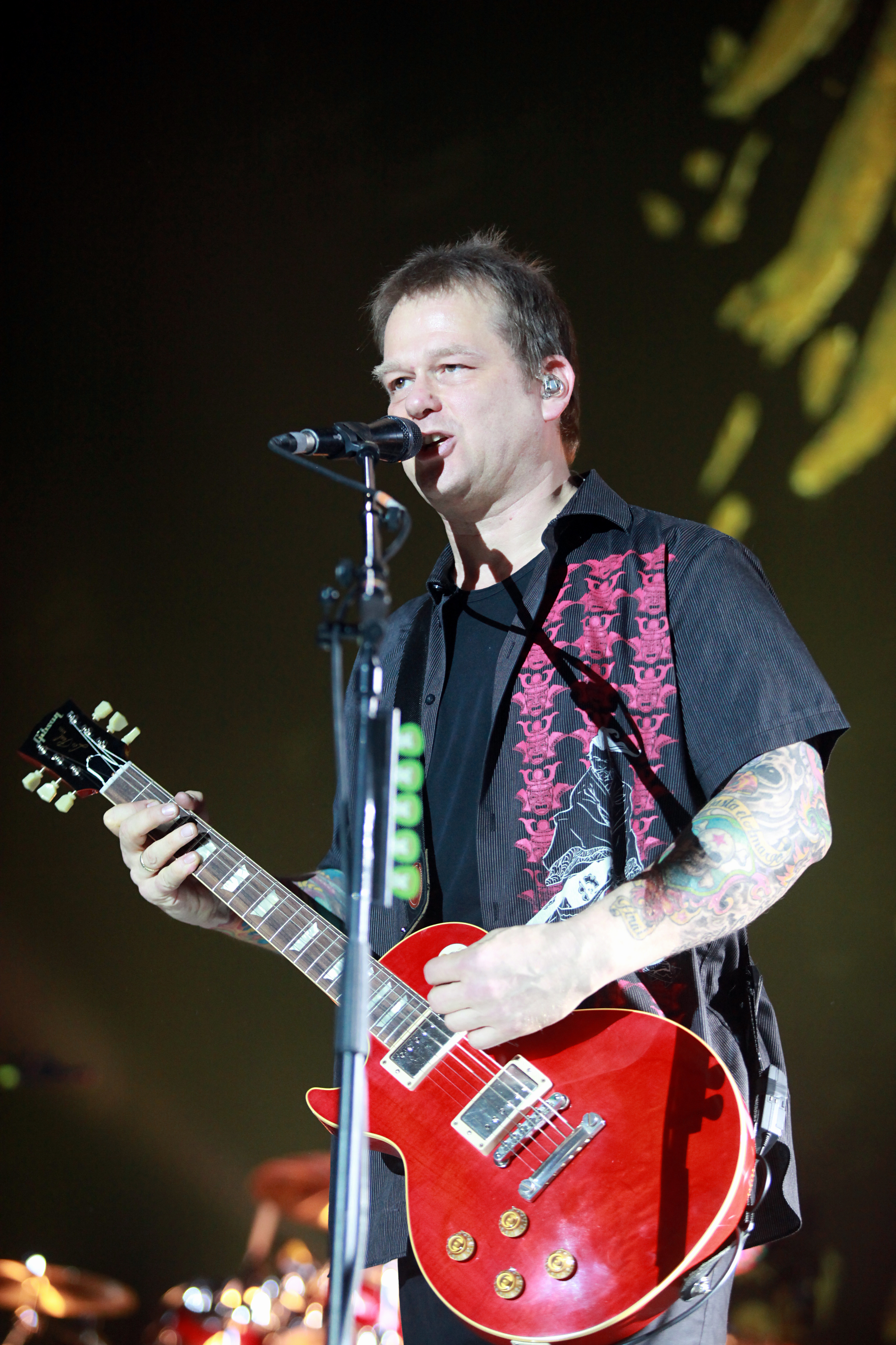 Andreas von Holst, genannt Kuddel, von den Toten Hosen am 15. Dezember 2012 in der SAP Arena in Mannheim.